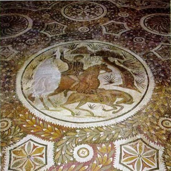 Moisaco de la habitación 8. Foto: de Garikoitz Estornés Zubizarreta, Museo de Navarra